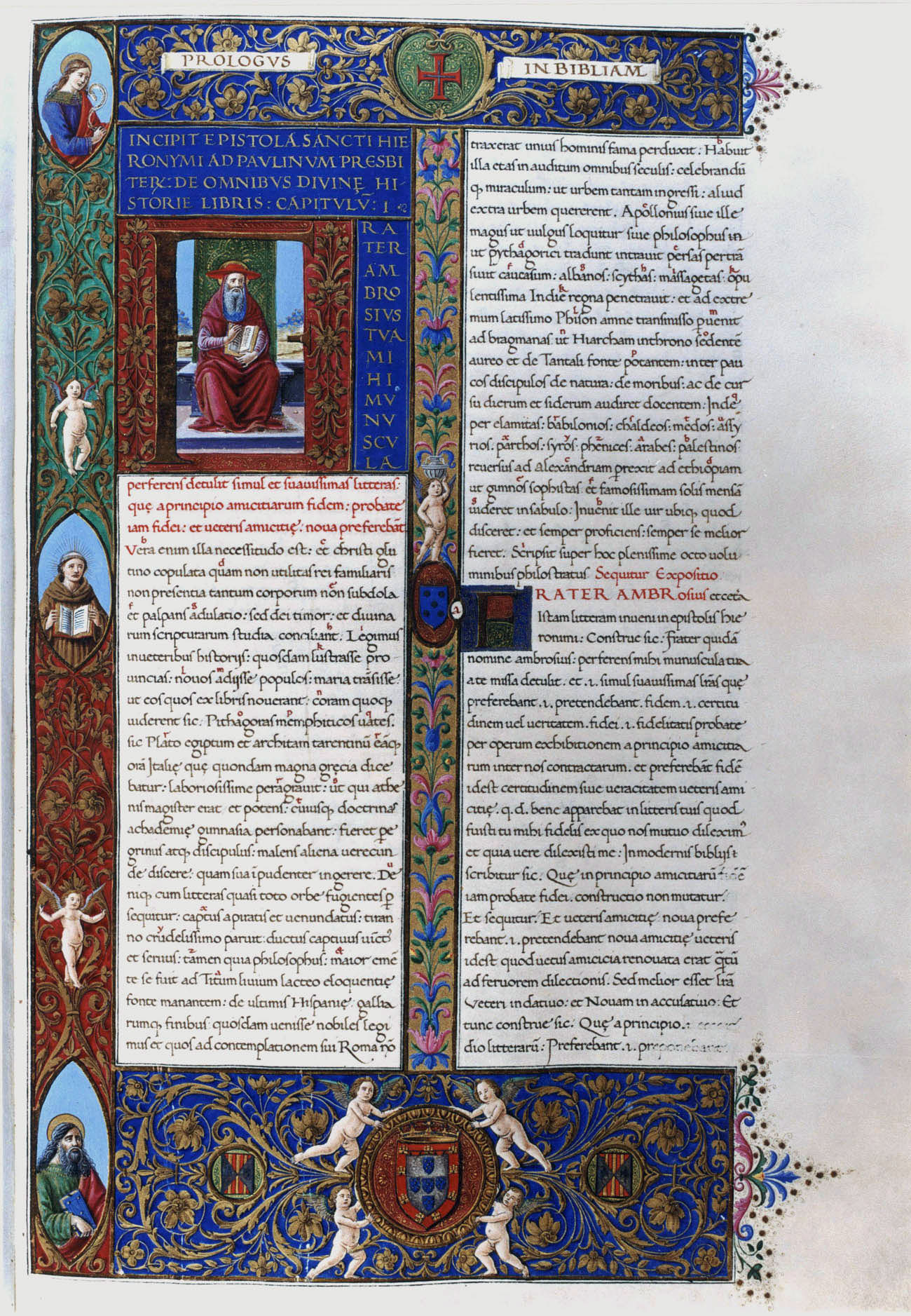 Bíblia dos Jerónimos, página do Vol. I